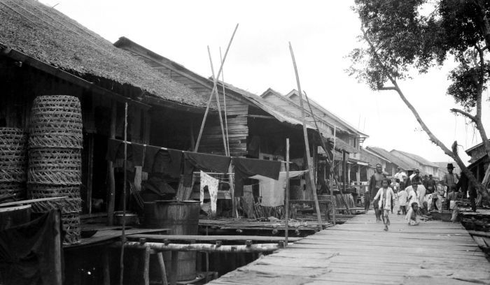 Repronegatief. Chinees kamp met houten weg op palen van 1200 meter lang en 3 meter breed, Bagan siapiapi, Sumatra